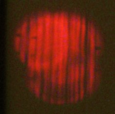 Autofokus-Hilfslicht auf weißer Wand im Dunkeln. Es wurde die in File:AF-Beleuchtung.jpg gezeigte Gerätschaft verwendet